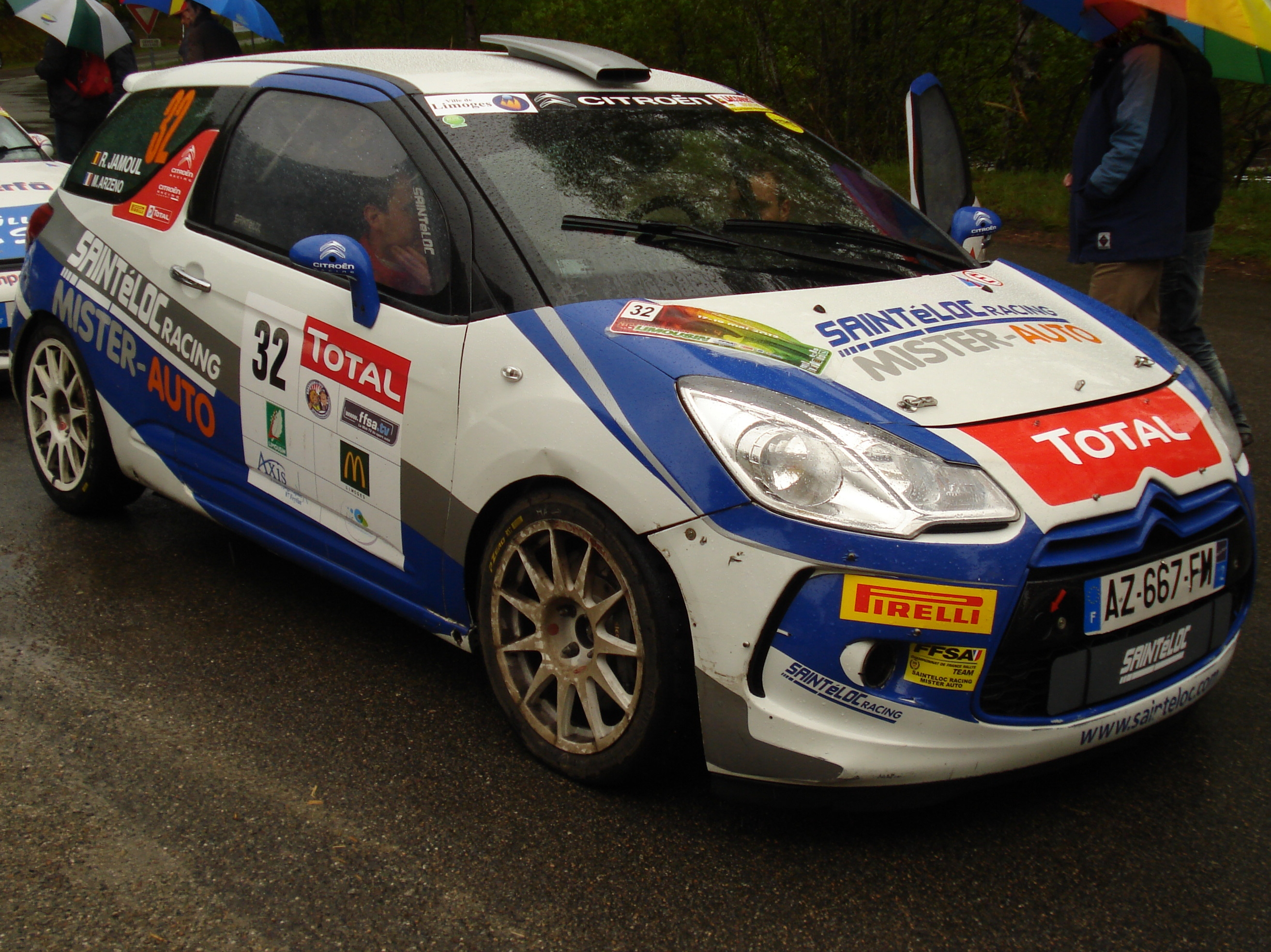 Mathieu Arzeno